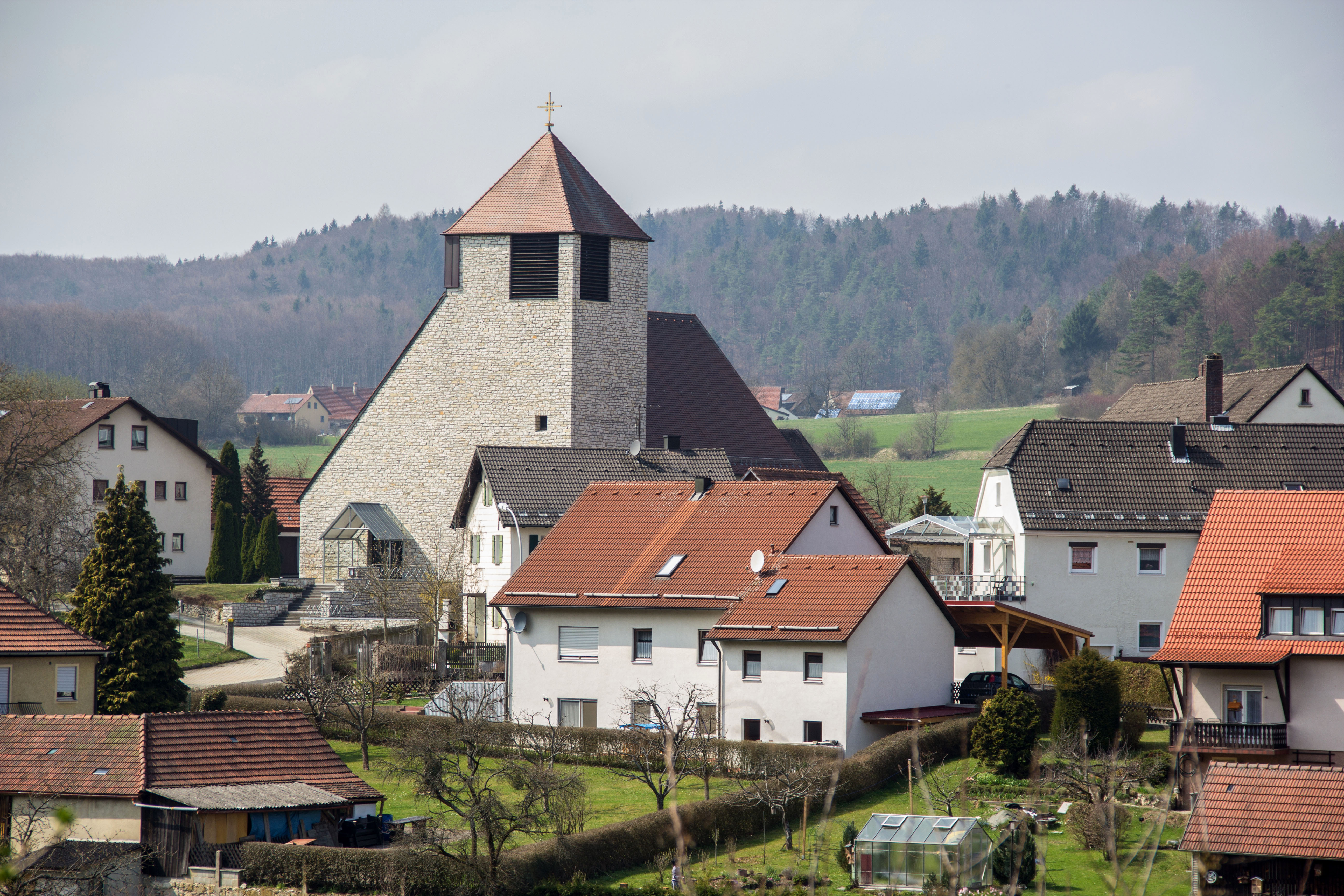 Königstein